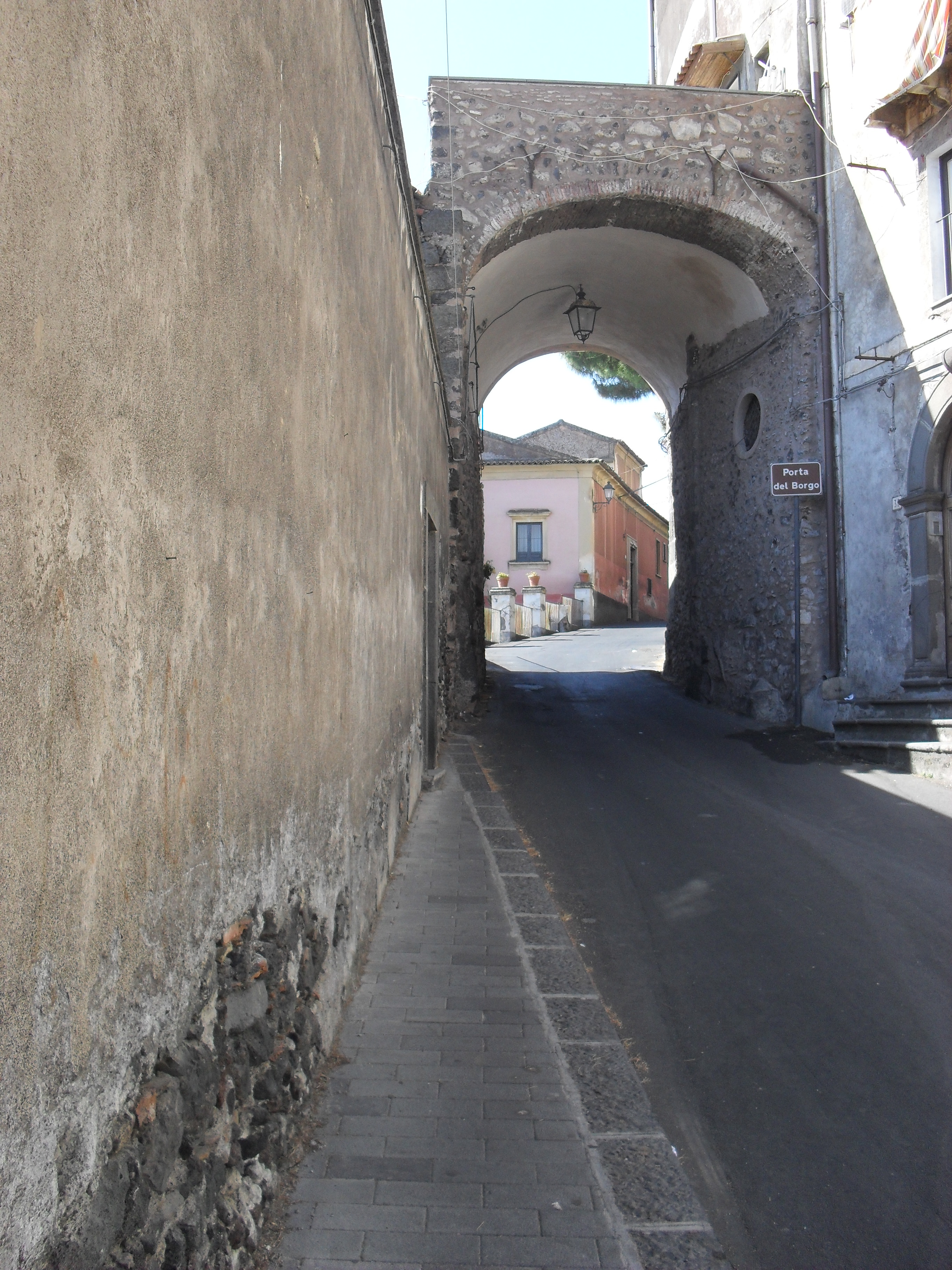 Porta del Borgo a Paternò Summary Porta del Borgo